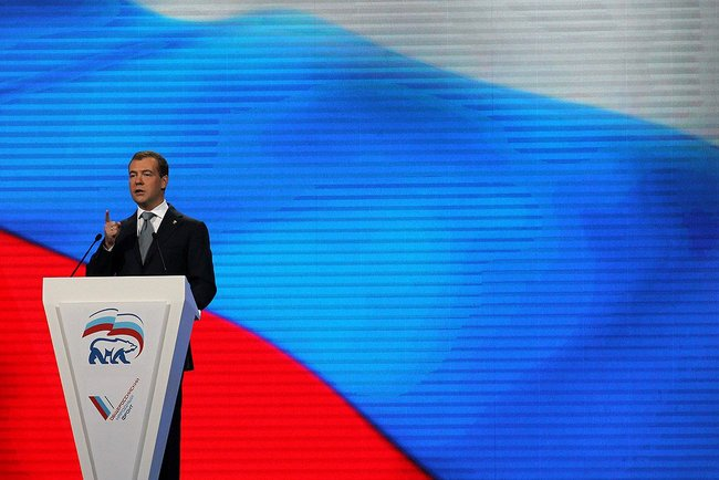 На съезде партии «Единая Россия».